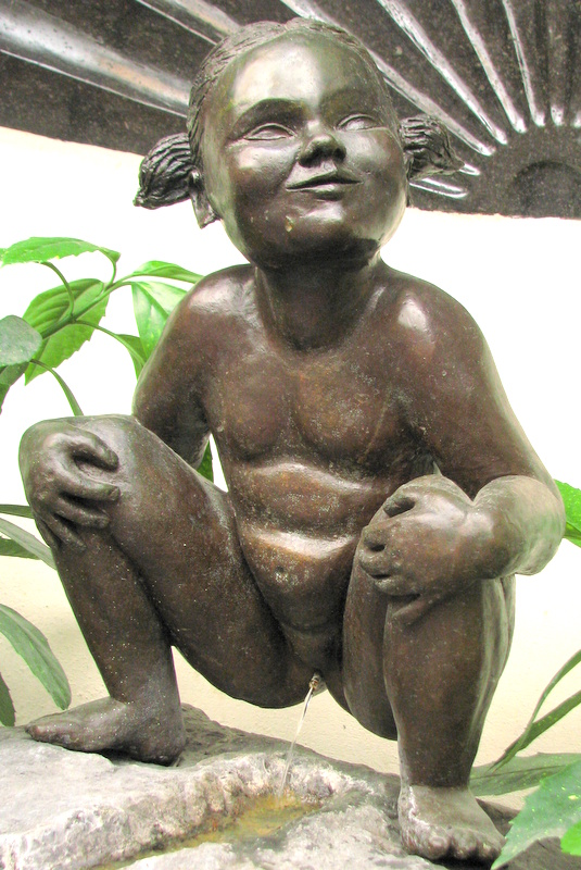 Bruksela, Jeanneke Pis - Siusiająca dziewczynka